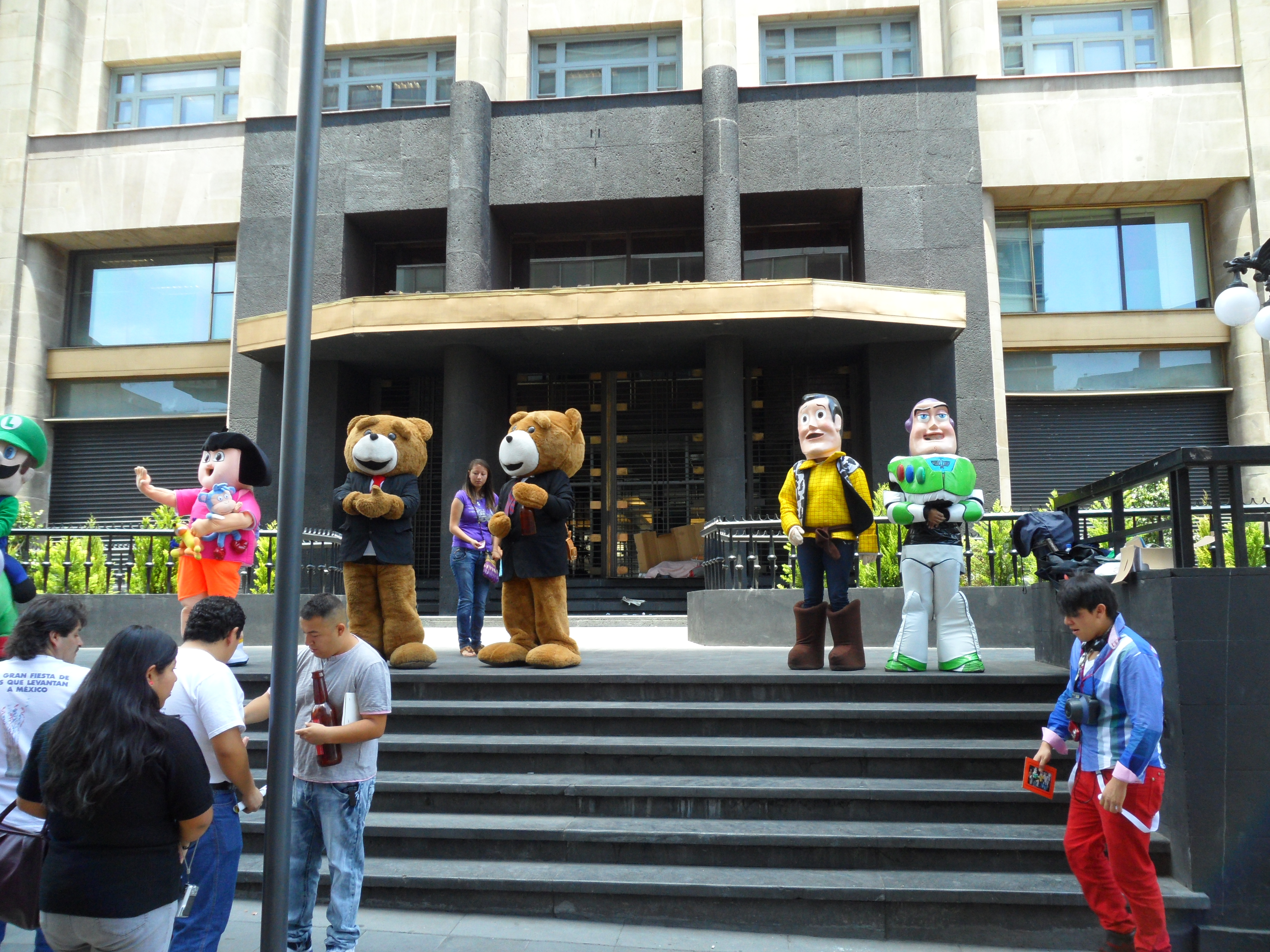 Botargas en Bellas Artes